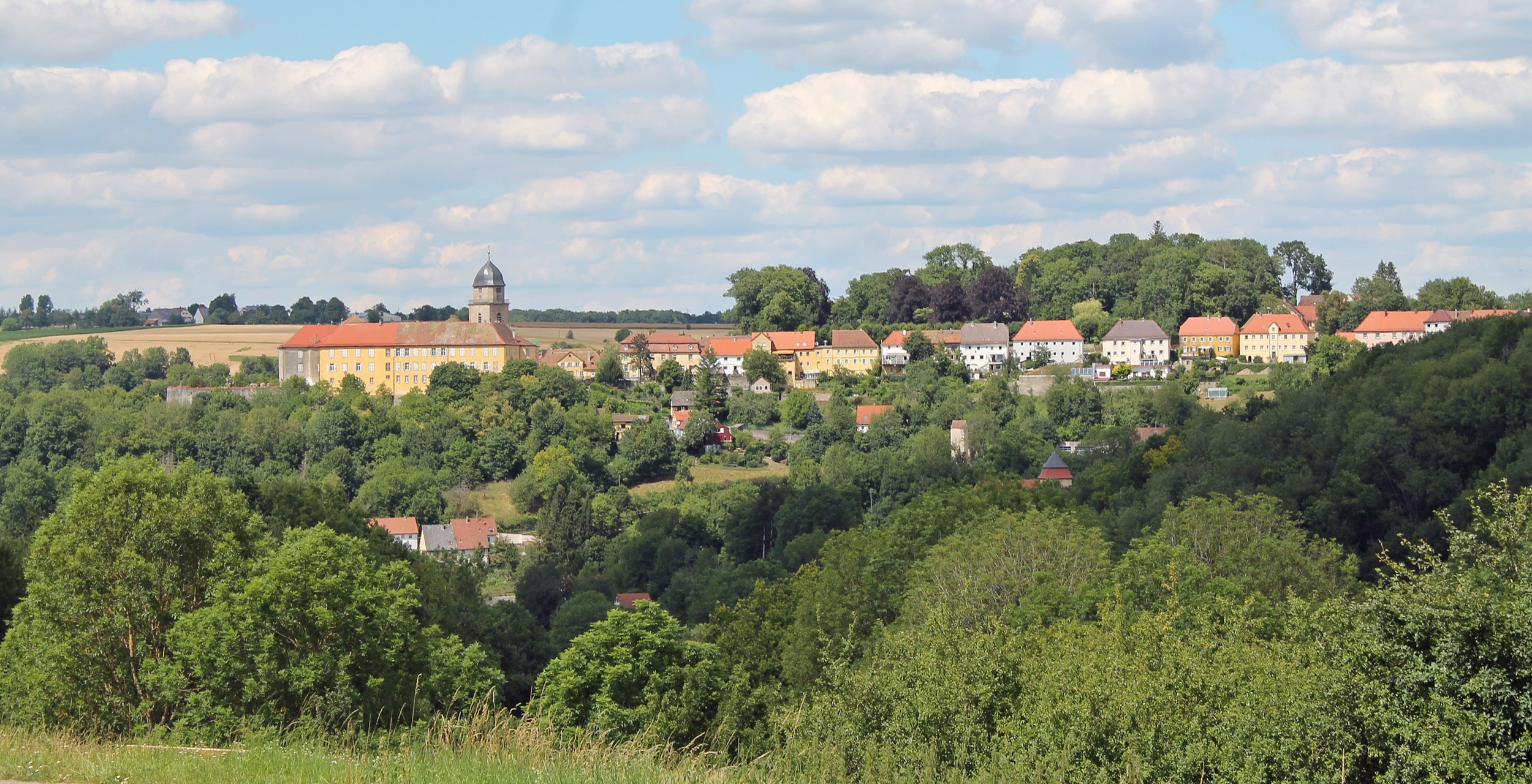 Bartenstein von Süden, Sommer 2020